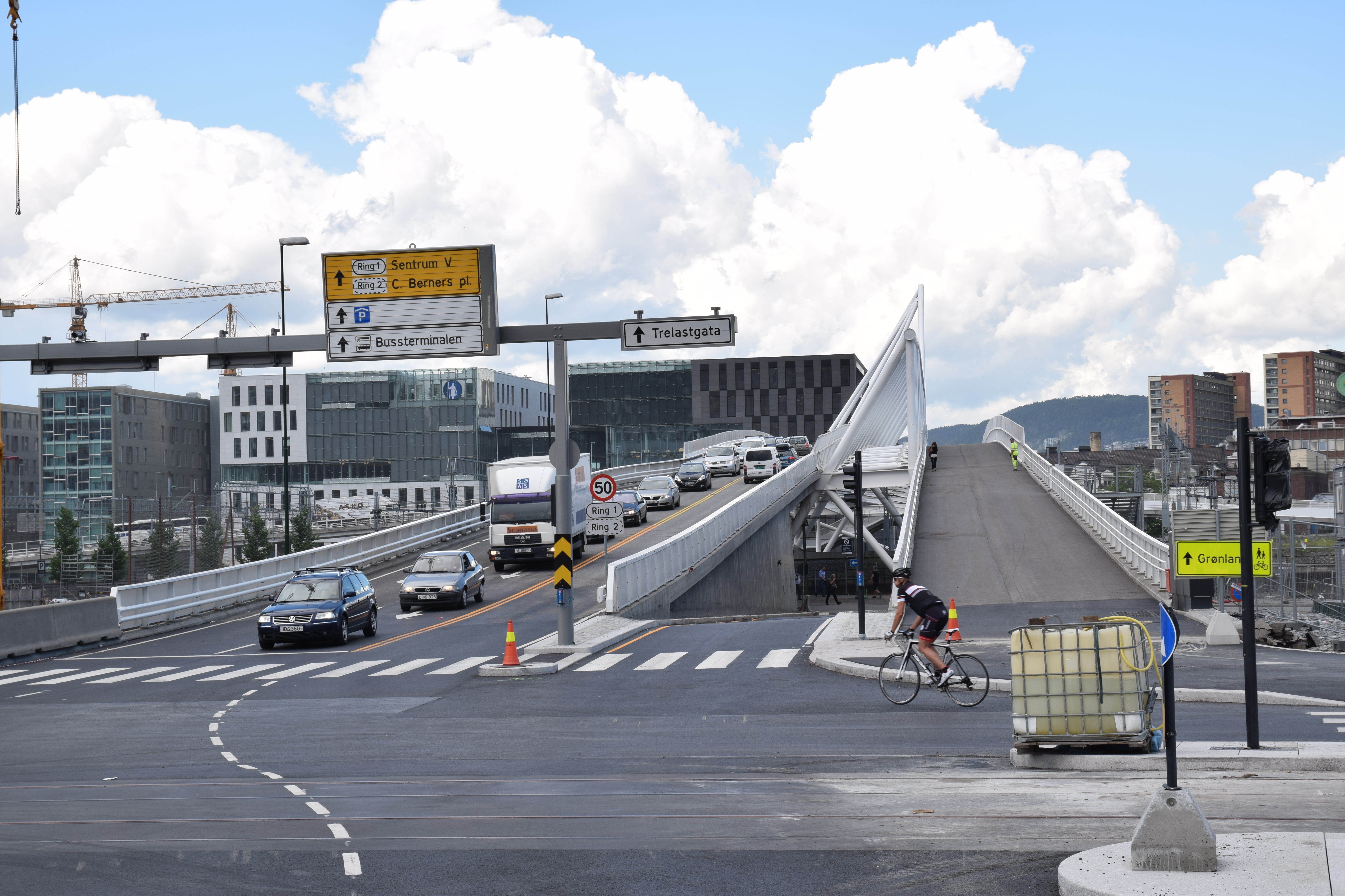 Nordenga bru, sett fra syd (krysset Kong Håkon 5.s gate / Dronning Eufemias gate)